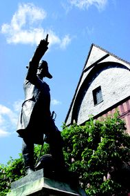 Le maréchal de Rochambeau, Vendômois de naissance, par Fernand Hamar.